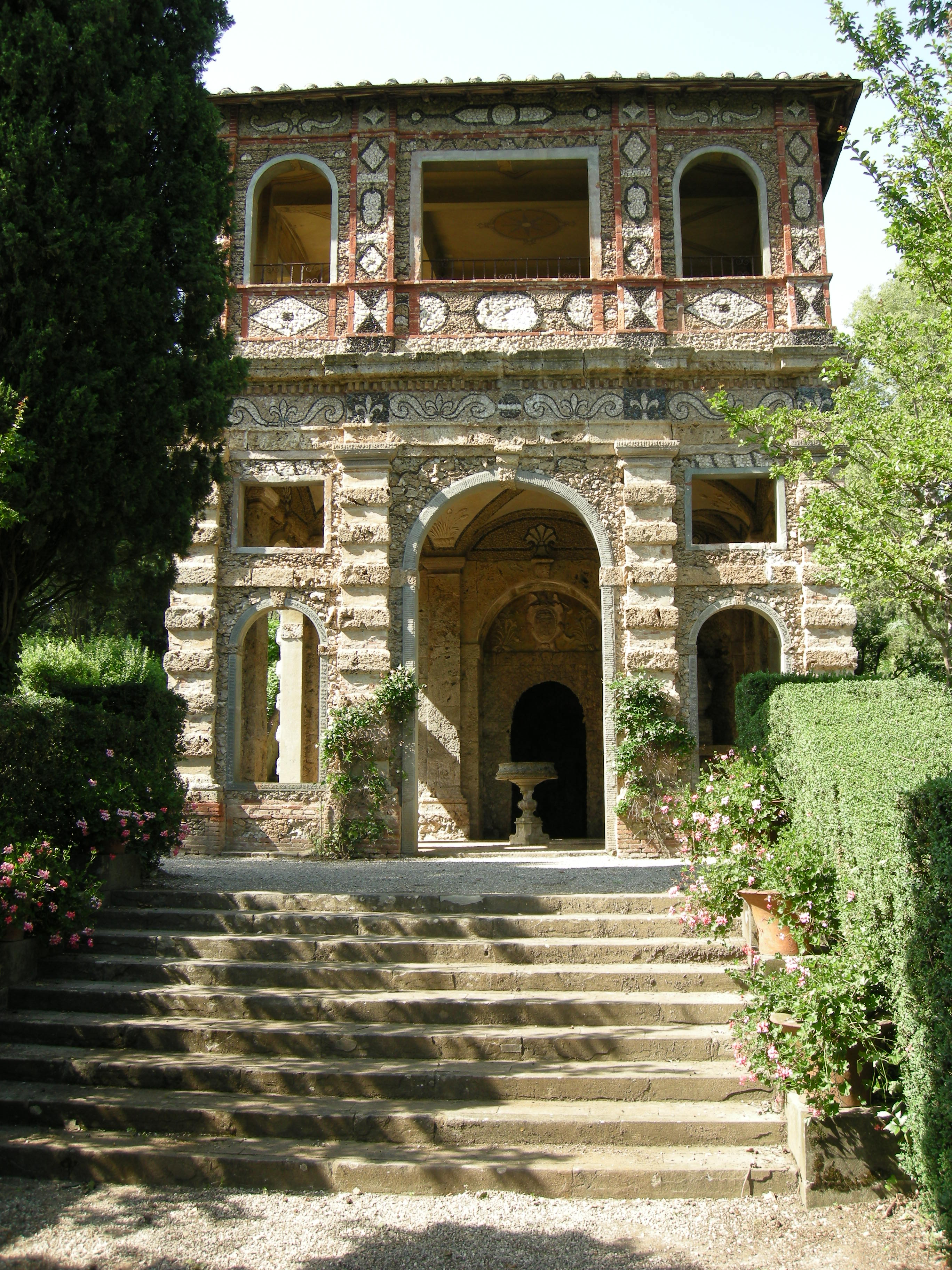 Villa reale di marlia, grotta del dio pan, esterno